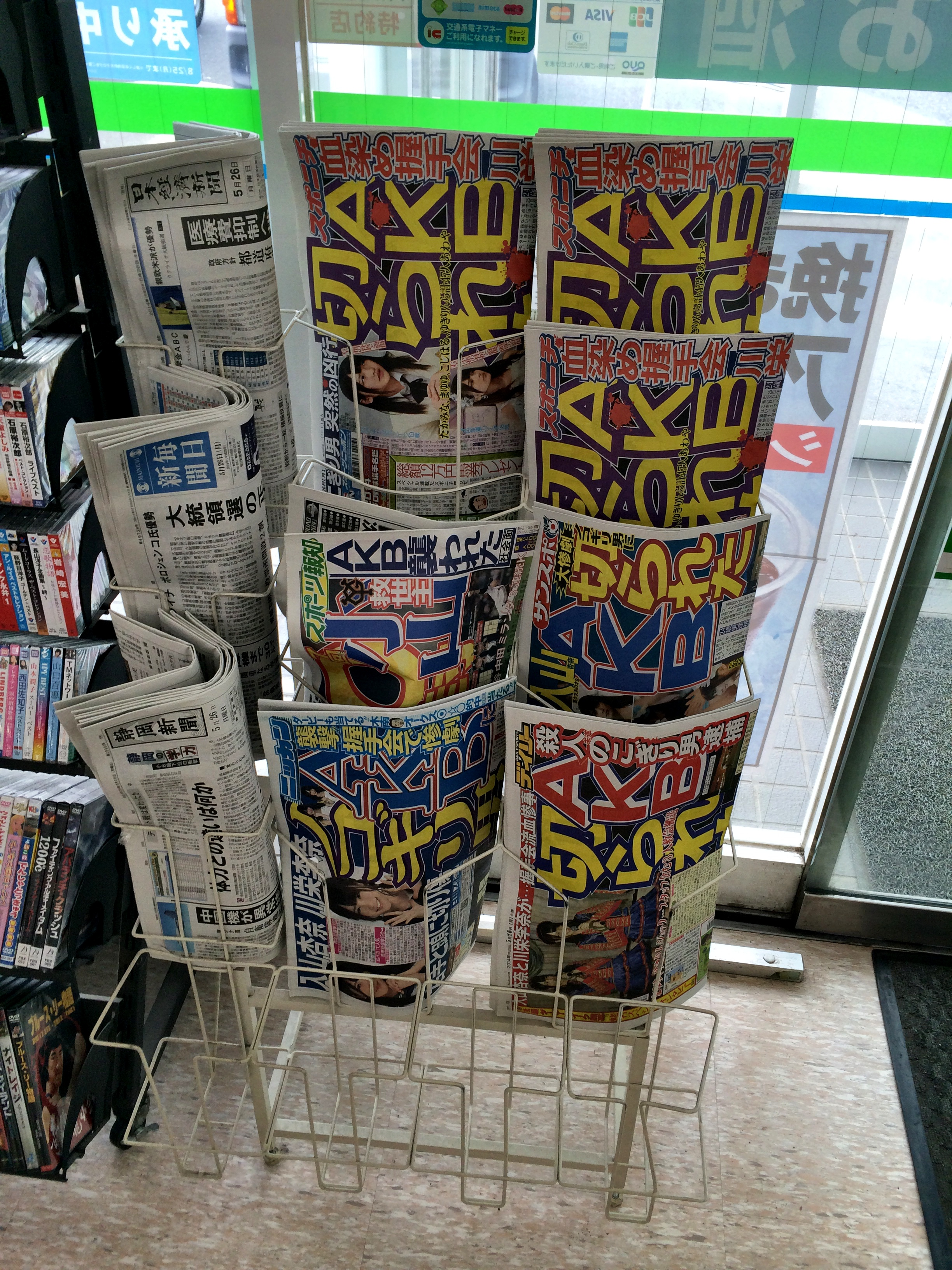 AKB48握手会傷害事件